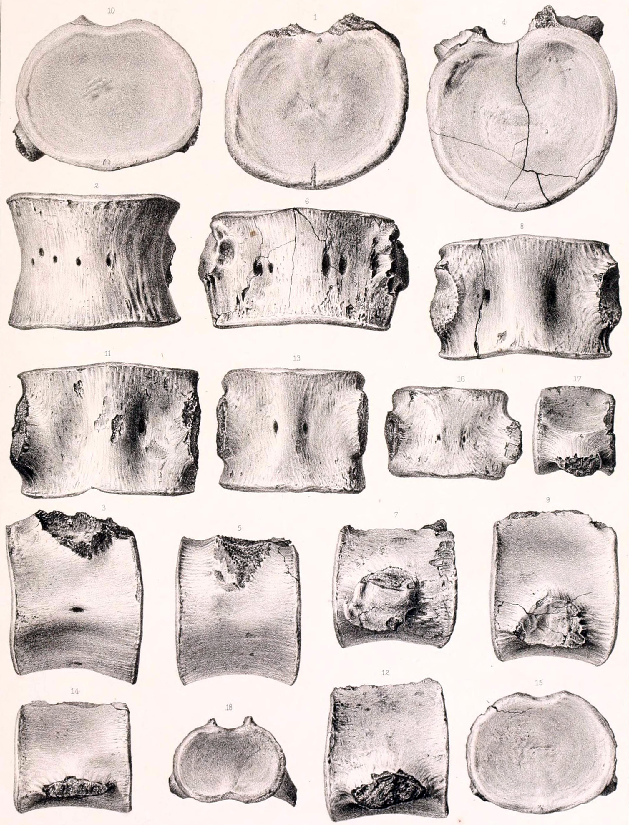 Cimoliasaurus magnus vertebrae.